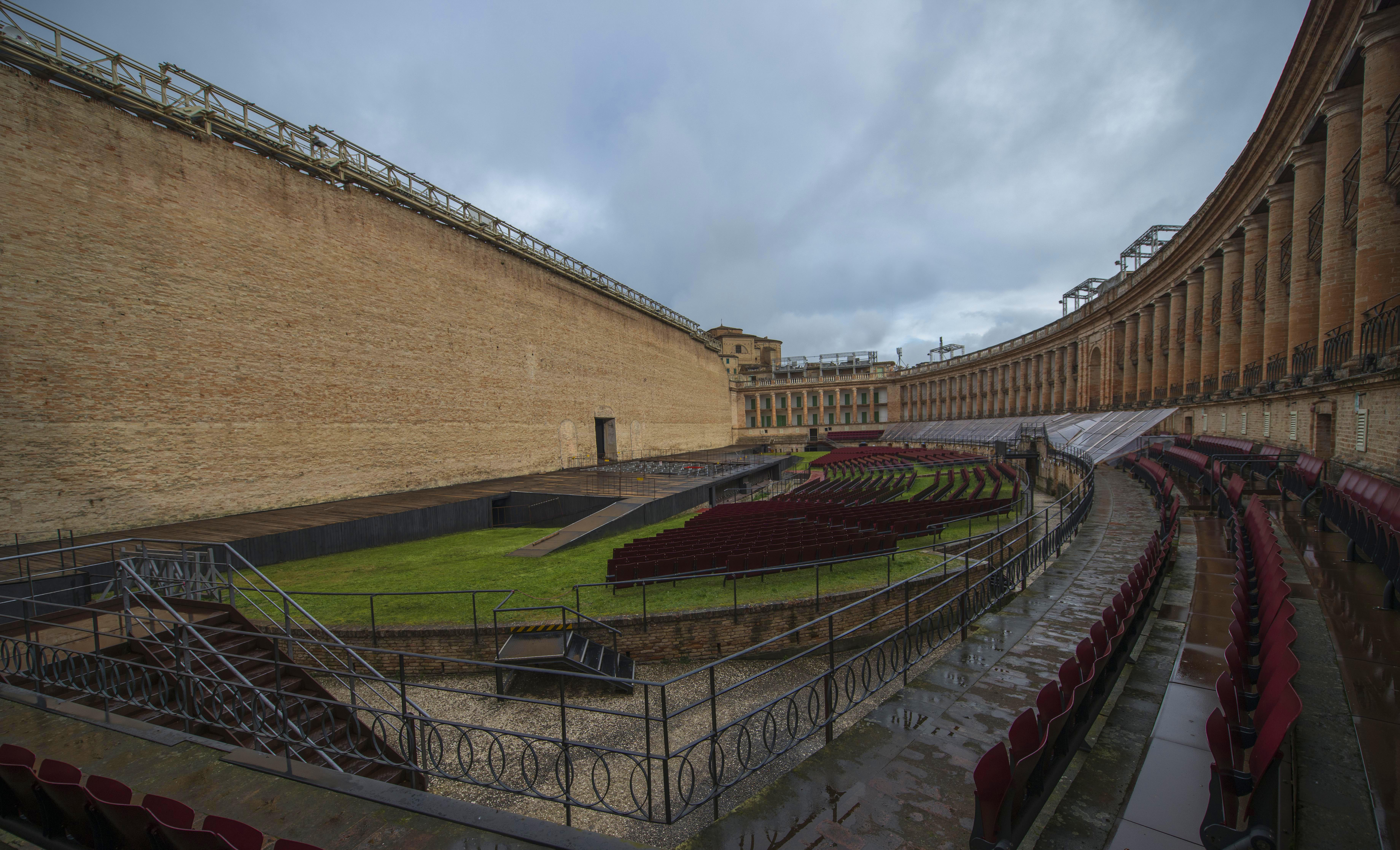 Arena Sferisterio This is a photo of a monument which is part of cultural heritage of Italy.